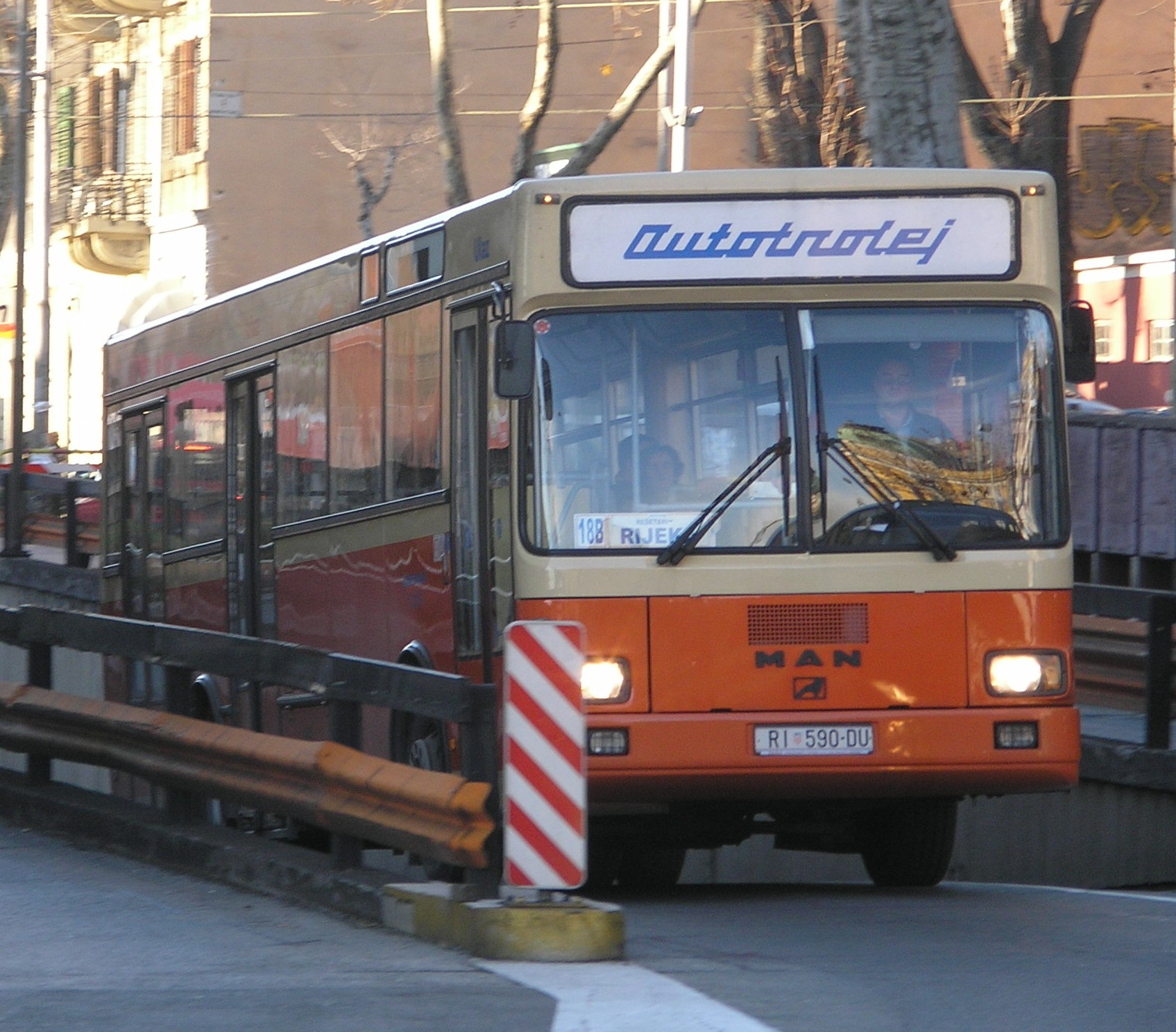 An Autotrolej bus in Rijeka